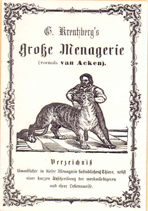 G. Kreutzberg's Große Menagerie (vormals van Acken). Verzeichniß sämmtlicher in dieser Menagerie befindlichen Thiere, nebst einer kurzen Beschreibung der merkwürdigeren und ihrer Lebensweise. Titel Museum für Geschichte der Stadt, Leipzig. Reprint der undatierten Originalausgabe (Görlitz, Köhler um 1835); (1988)